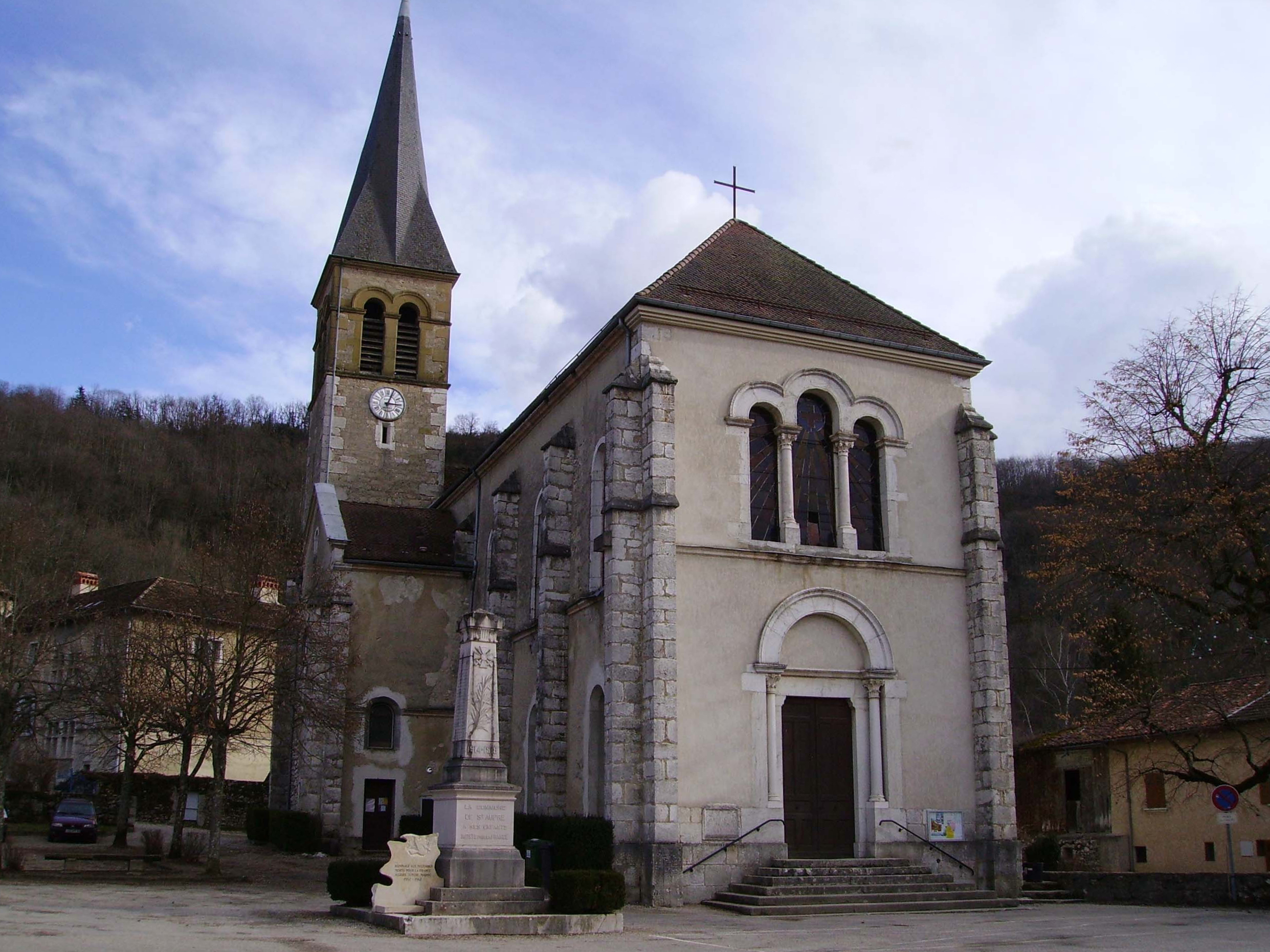 L'église de Saint-Aupre (Isère, France) Photo Arnaud-Victor Monteux 21/02/2006